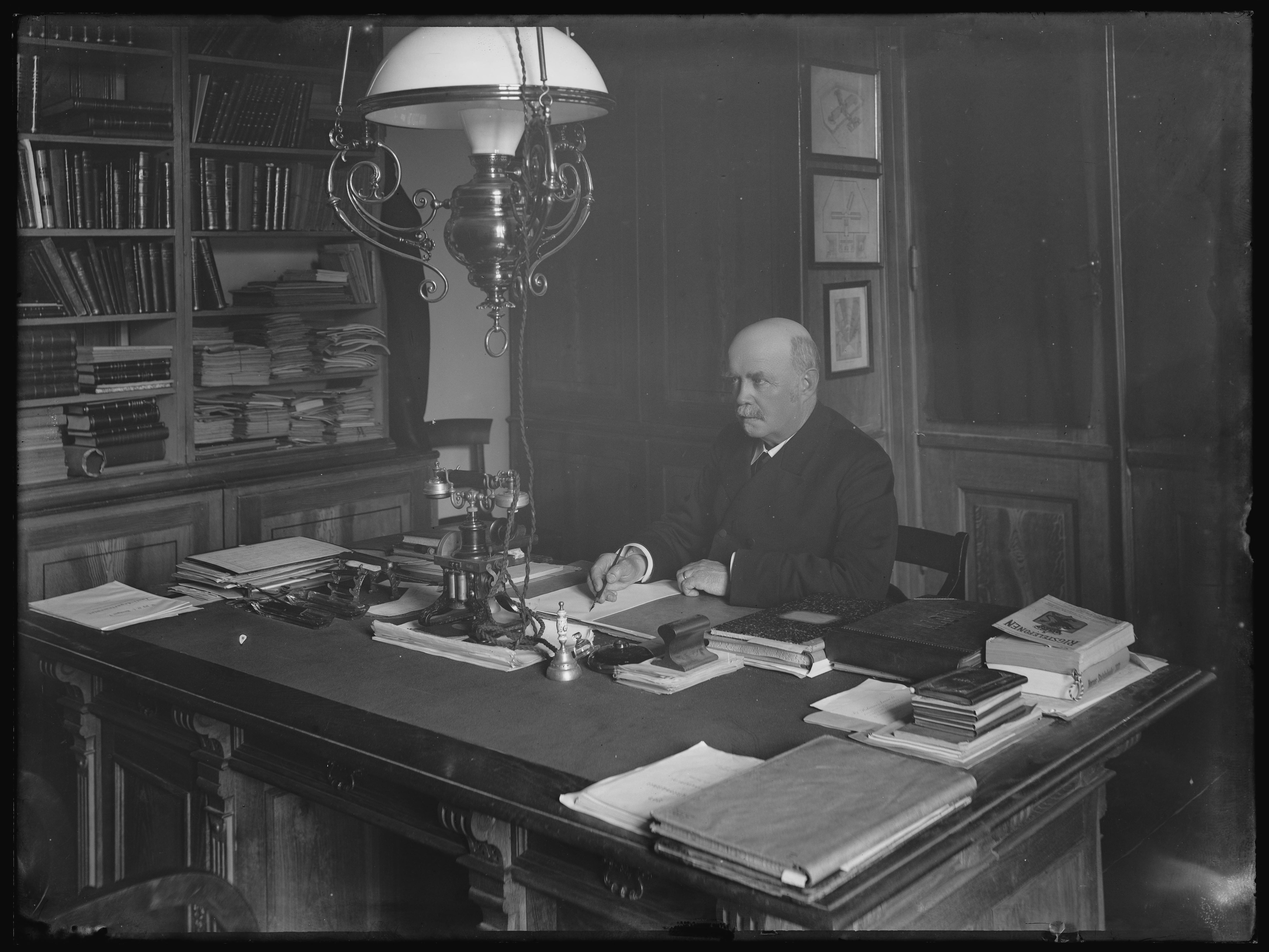 Bildet er hentet fra Nasjonalbibliotekets bildesamling. Anmerkninger til bildet var: Påskrift arkivark: Direktør Daae Bodsfængslet Eldste arkivnummer: 210 Yngre arkivnummer: 23 Grønland,Oslo, Oslo, Oslo «læge, direktør ved Botsfengslet dr. Anders Daae (1838—1910)»